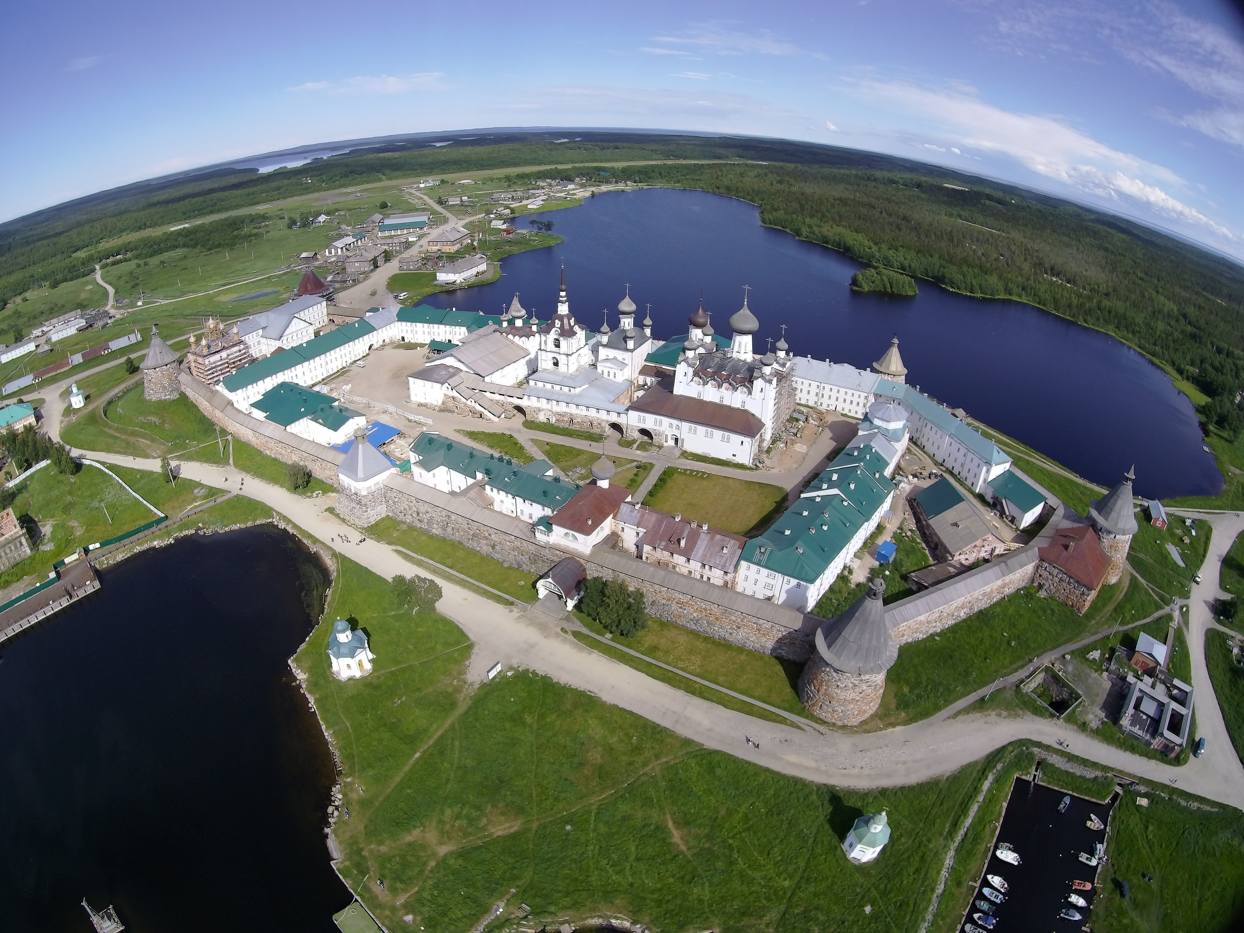 Letecký snímek Soloveckého kláštera